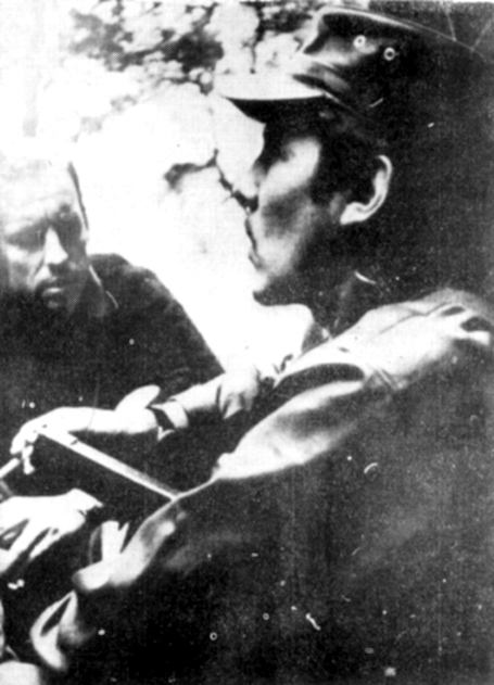 Eduardo Galeano Entrevista al guerrillero guatemalteco César Montes